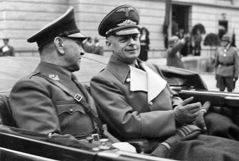 Joachim von Ribbentrop und Ante Pavelic SCherl Bilderdienst Der kroatische Staatsführer Dr. Pawelitsch in Salzburg. Nach Ankunft des kroatischen Staatsführer Dr. Pawelitsch [Pavelic] am Freitag, den 6.6.41 in Salzburg. Dr. Pawelitsch mit dem Reichsminister des Auswärtigen von Ribbentrop [l.] auf dem Wege zum Hotel. Schr/PBZ [Presse-Bild-Zentrale]; herausg. 9.6.41, Bildb. Henkel Abgebildete Personen: Ribbentrop, Joachim von: Außenminister, NSDAP, Deutschland Pavelic, Ante Dr.: Staatschef, Kroatien